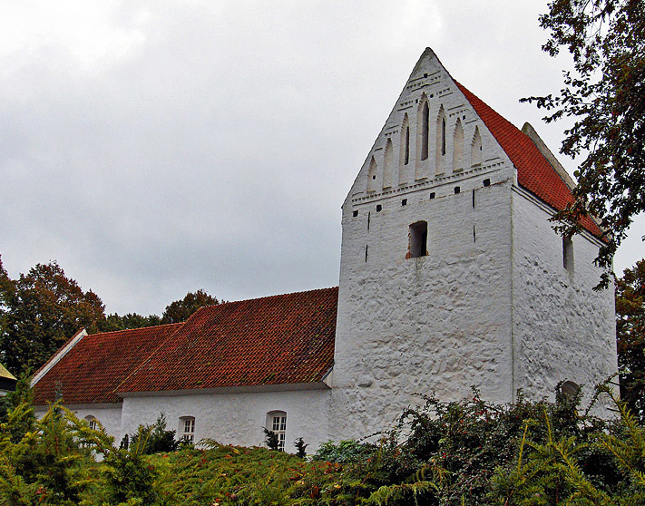 fra nordvest